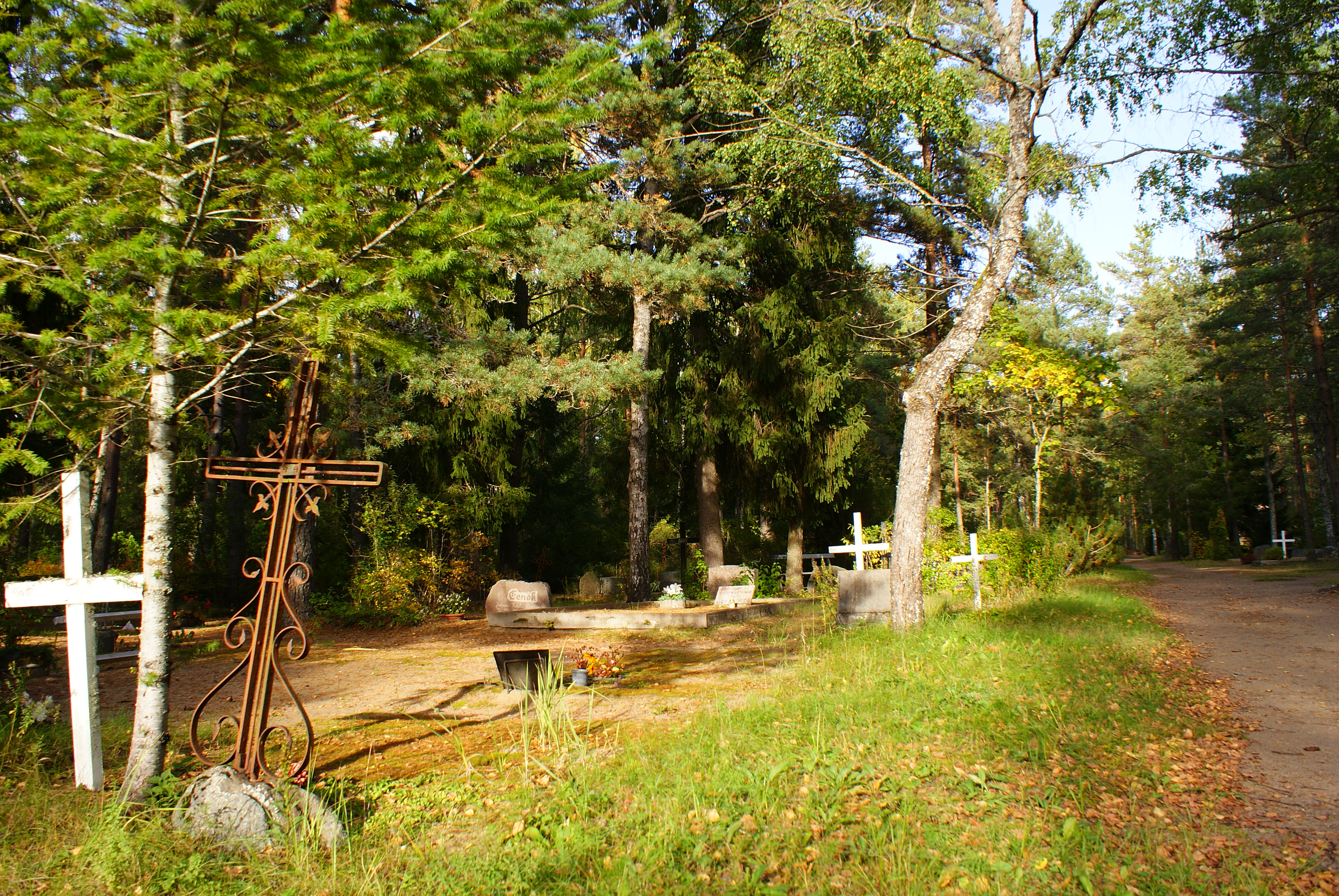 Kuusalu kalmistu